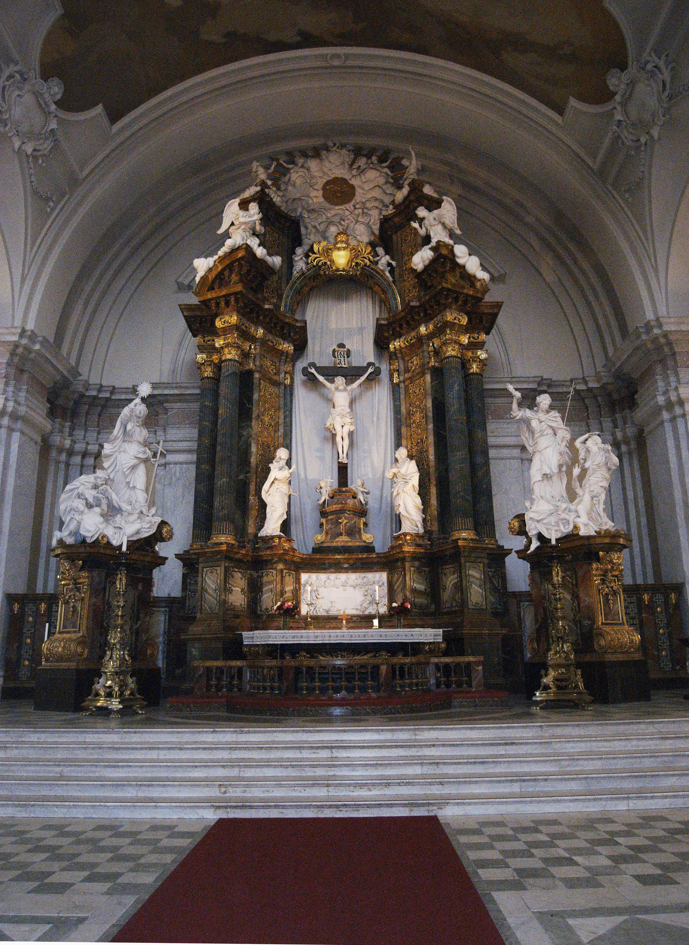 Gustaf Vasa kyrka (Syrenen 1)